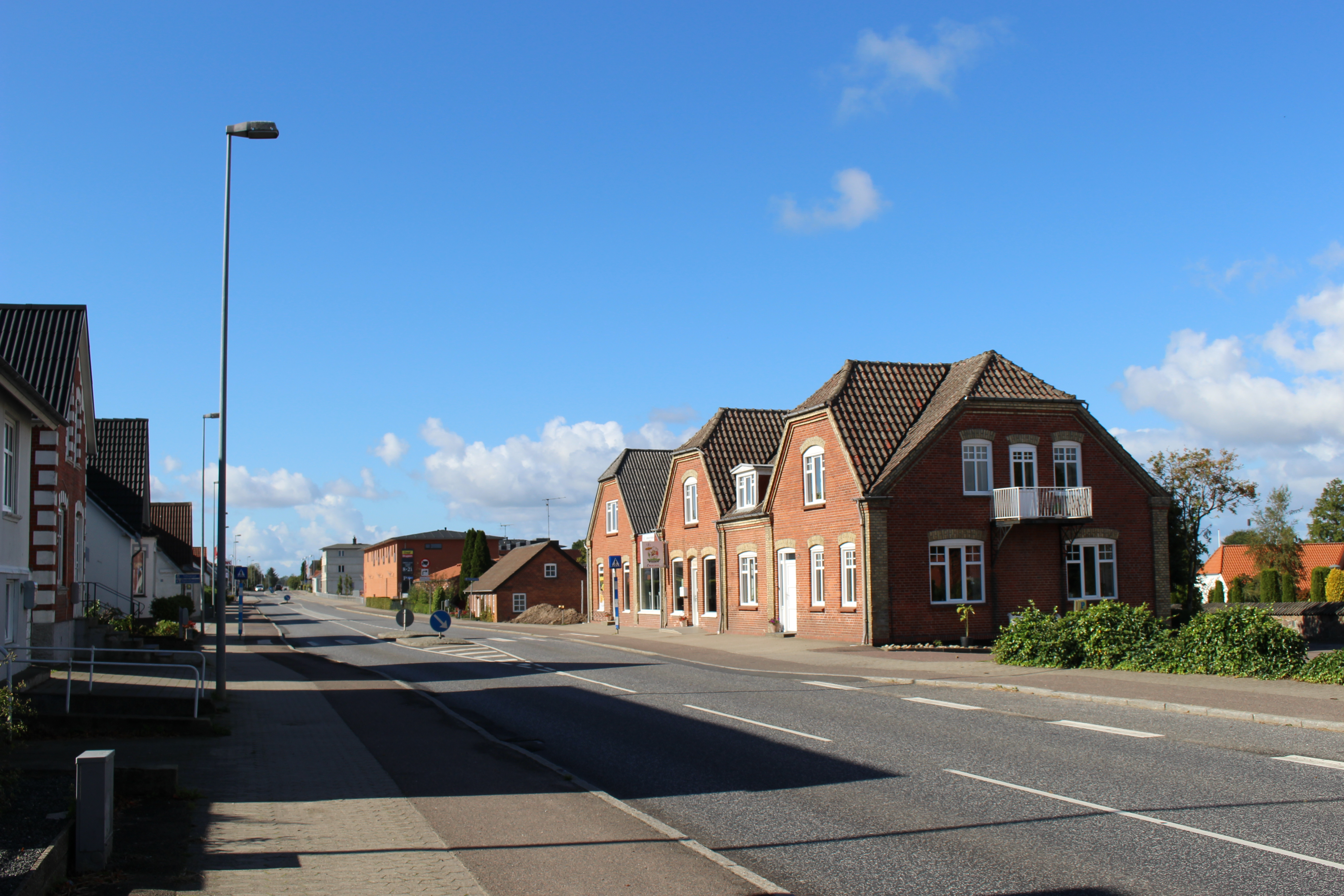 Østergade, Ørum Sønderlyng, med retning mod vest.